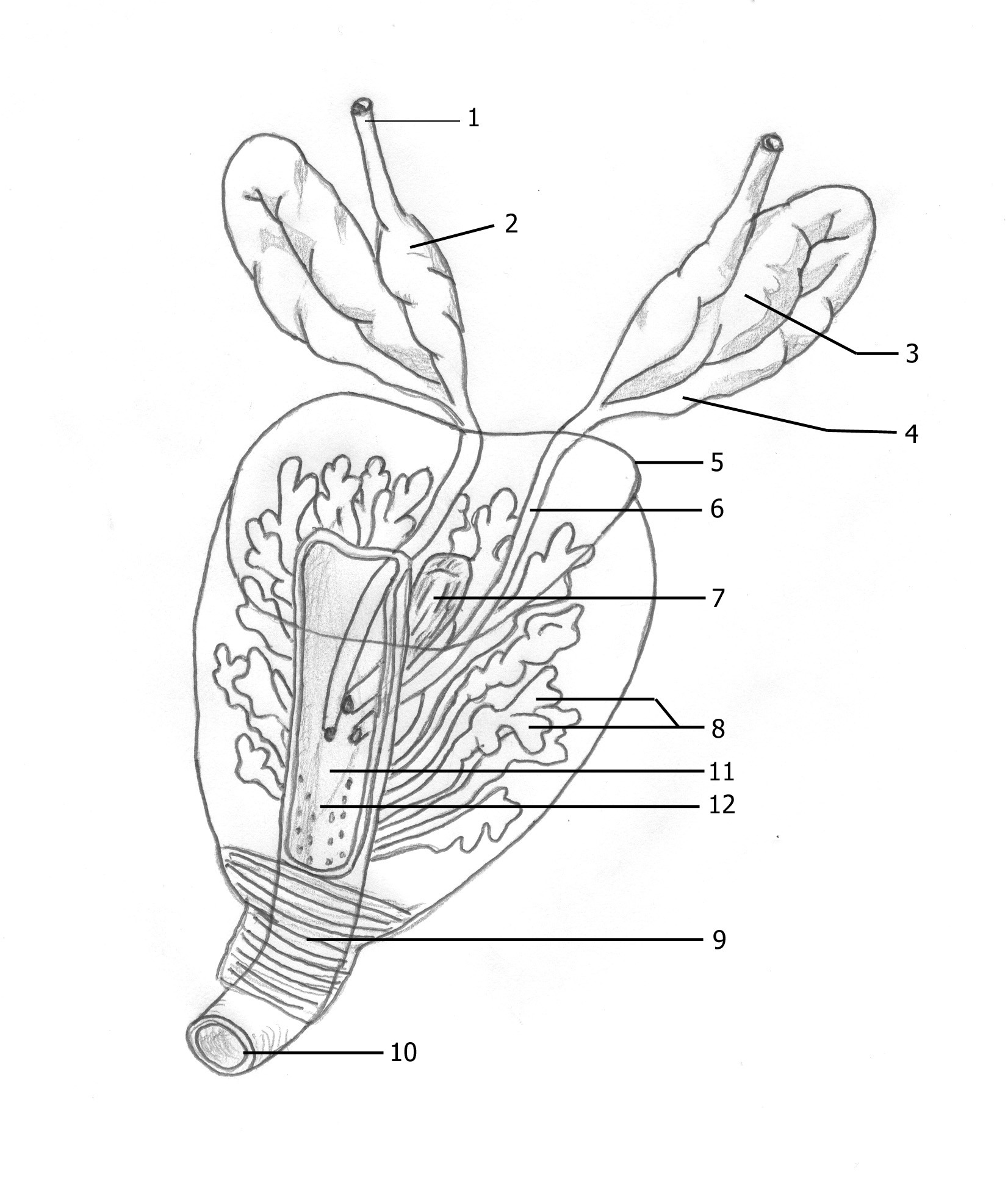 Représentation artistique de la prostate de 3/4 et des vésicules séminales, la vessie a été volontairement retirée et la prostate est translucide pour faciliter l'observation. Descriptif : Conduit déférent Ampoule du conduit déférent Vésicule séminale Conduit excréteur de la vésicule séminale Contour de la prostate Conduit éjaculateur Utricule prostatique Substance glandulaire Sphincter de l'urètre Urètre Colliculus séminal Crête urétrale Auteur : Raziel 25 mai 2006 à 19:03 (CEST) Date de création : 25/05/06 catégorie:appareil reproducteur